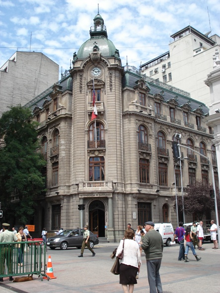 Edificio de la Intendencia Regional Metropolitana, en Santiago de Chile.